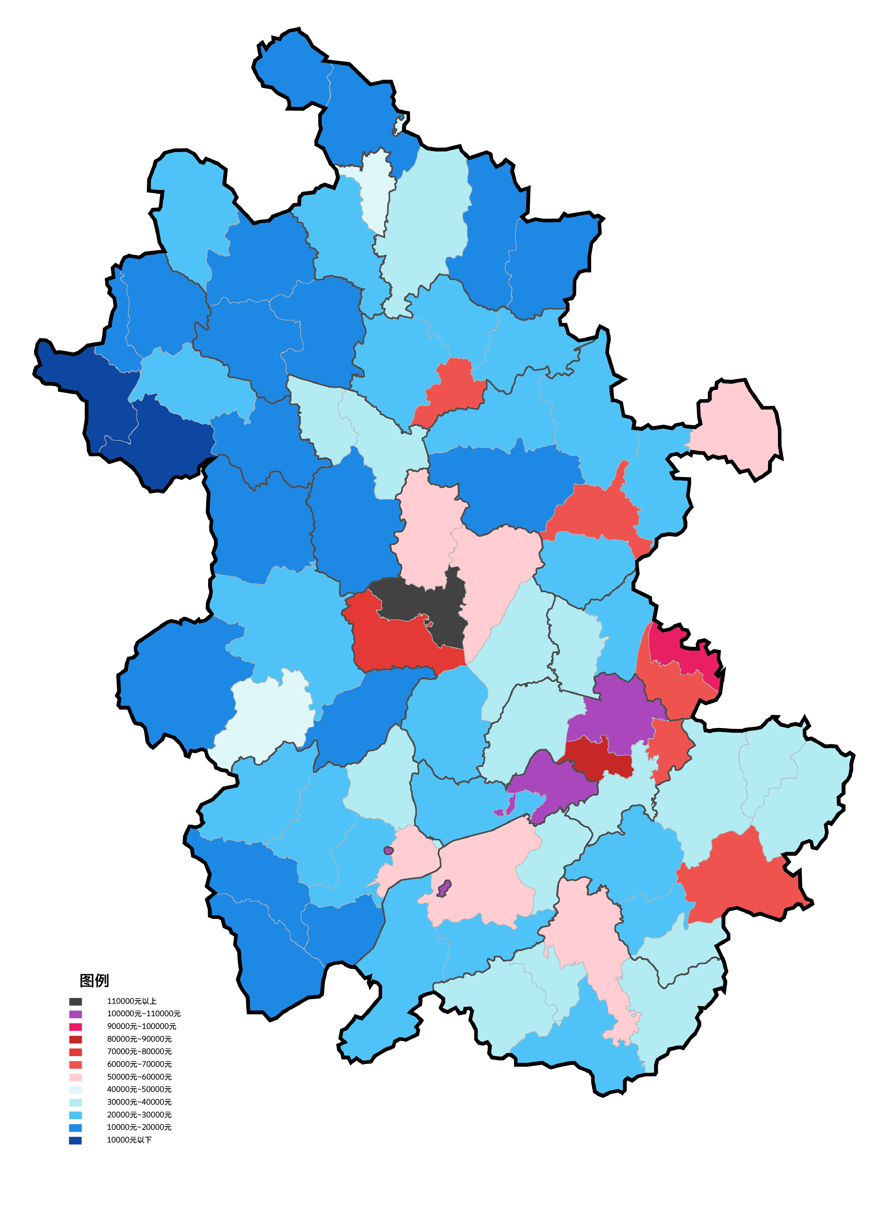 安徽省县市根据2016年人均地区生产总值填色地图